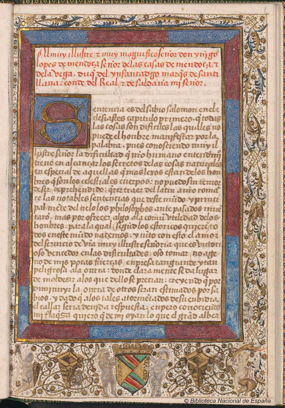 Sphaera mundi. Título: Tratado de la esfera . Inc.: Segund dize el euclides la esfera se notifica por (h. 2v)... Exp.: aqui acabo Juan de Sacrobosco el su tractado de la esfera, fin. (27v) trasladado de latin en romance por el Reuerendo maestro de Veas, maestro en artes y en Santa theologia Autor: Johannes de Sacro Bosco